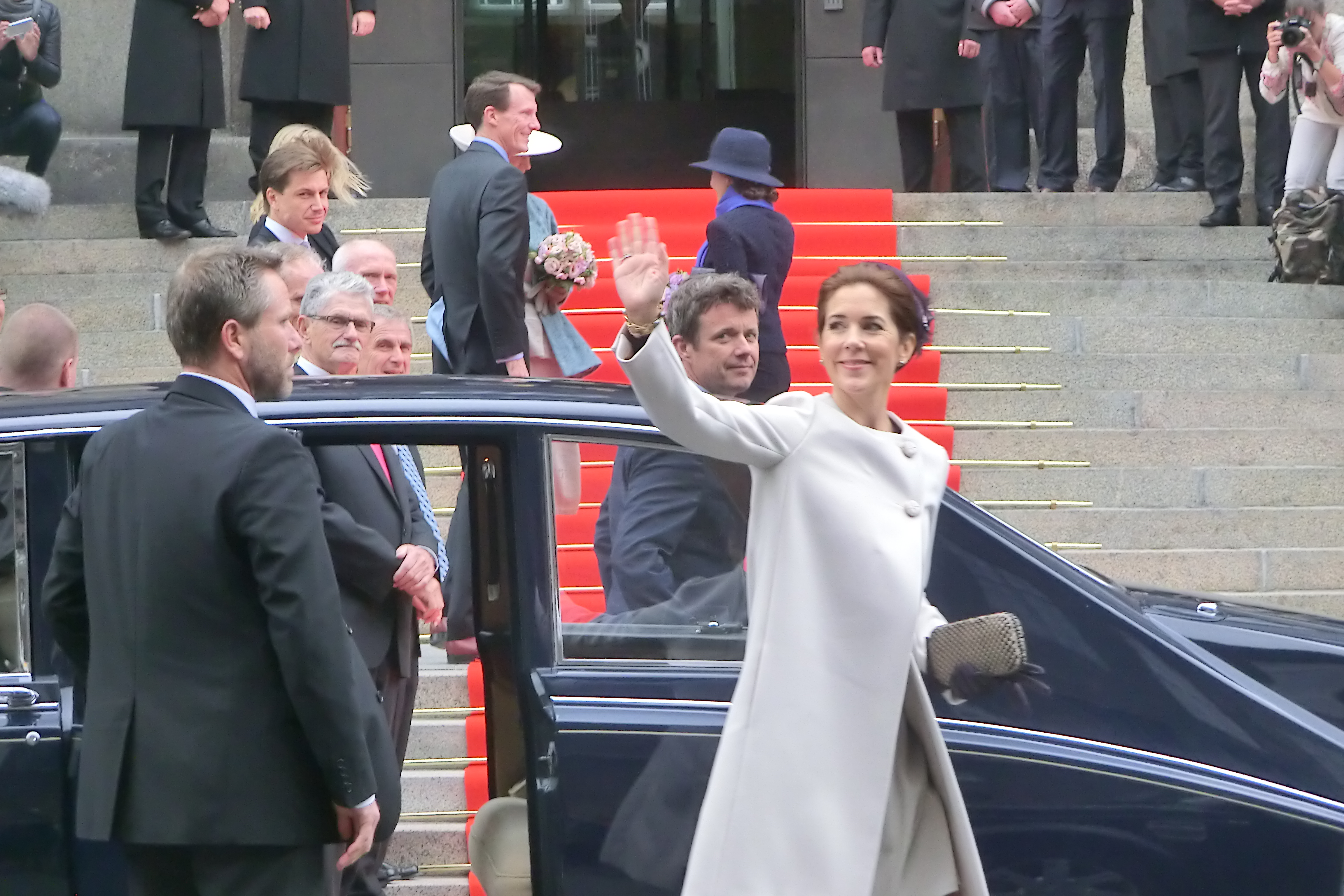 Federico di Danimarca e Mary Donaldson